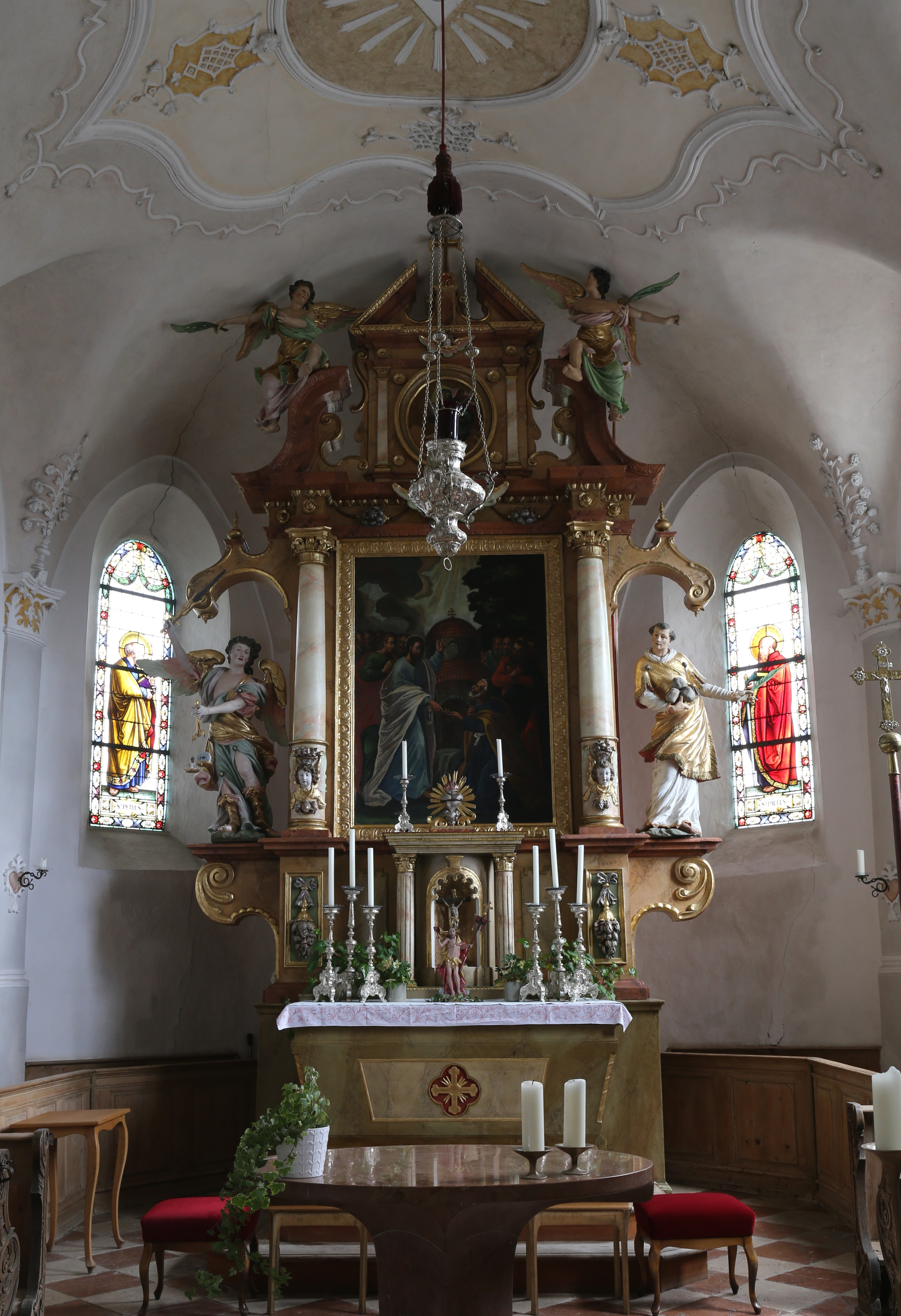 Steinkirchen 1, Samerberg; Katholische Kirche St. Peter und Friedhof, spätgotische Anlage, Ende 15. Jahrhundert, im Inneren barockisiert; mit Ausstattung; Friedhof mit Ummauerung und schmiedeeisernen Grabkreuzen, 18.–20. Jahrhundert